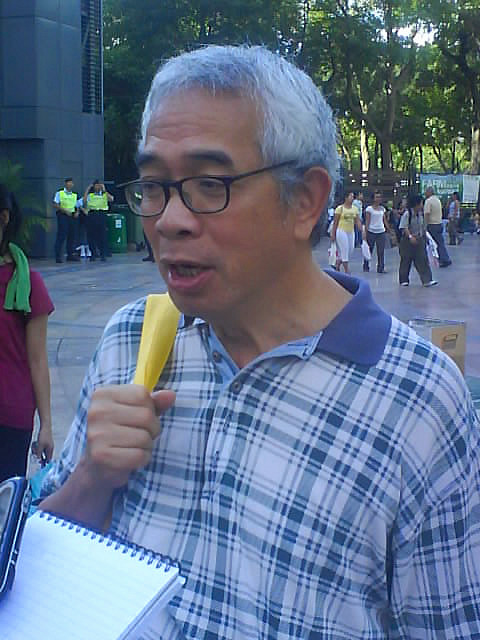 程翔